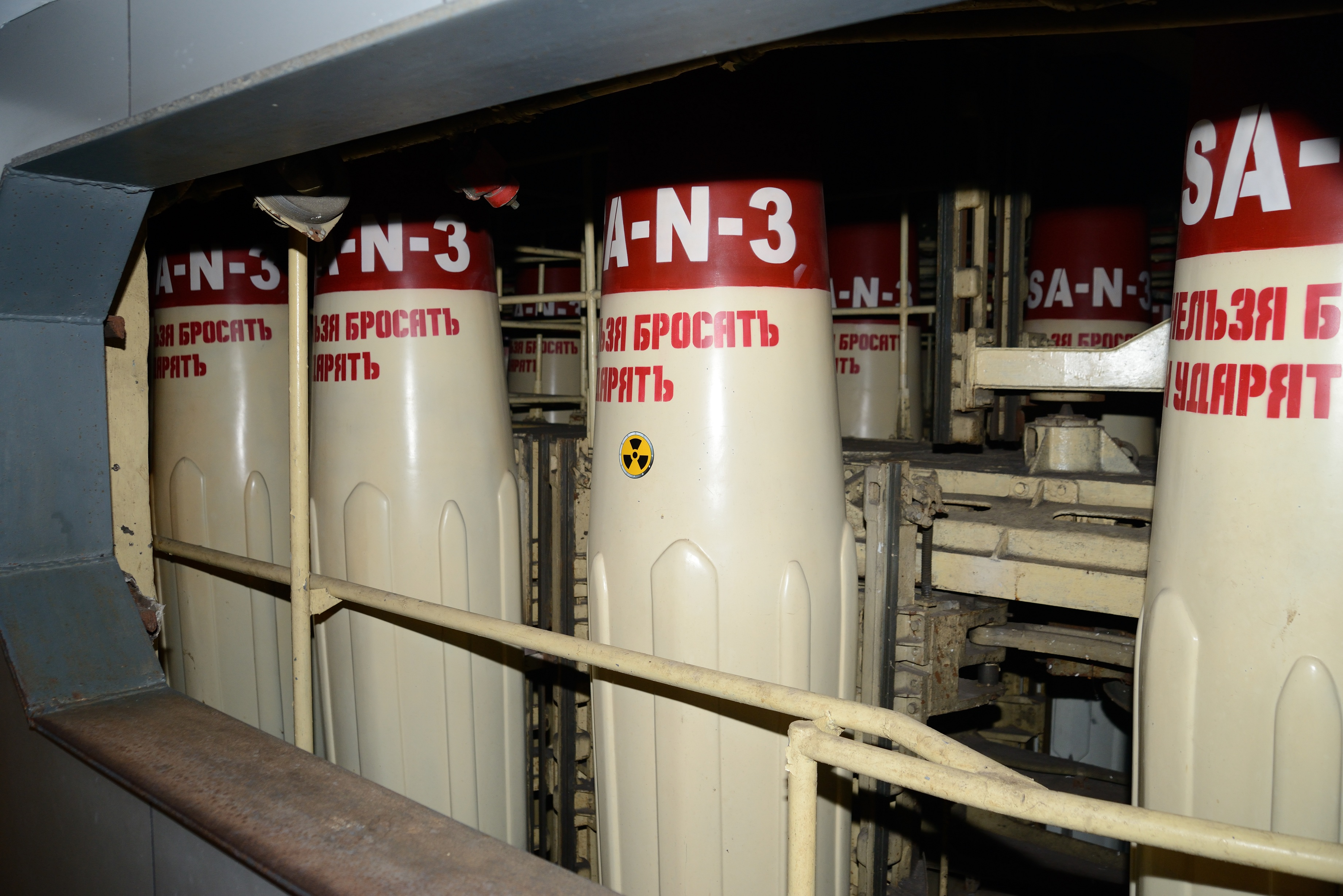 Авианосец "Минск" Май 2013г